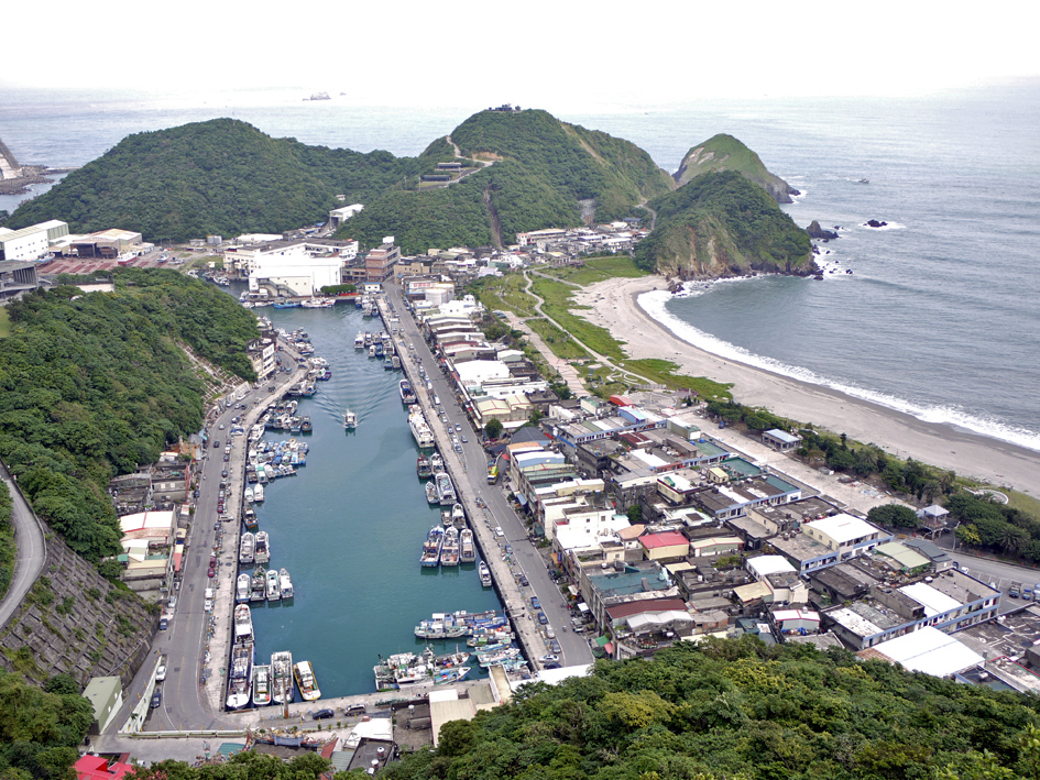 鳥瞰內埤漁港（南方澳第二漁港）